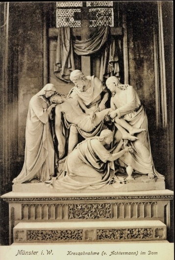 Kreuzabnahme von Wilhelm Achtermann (+1884) im Dom zu Münster, zerstört im II. Weltkrieg. Postkarte datiert von 1904